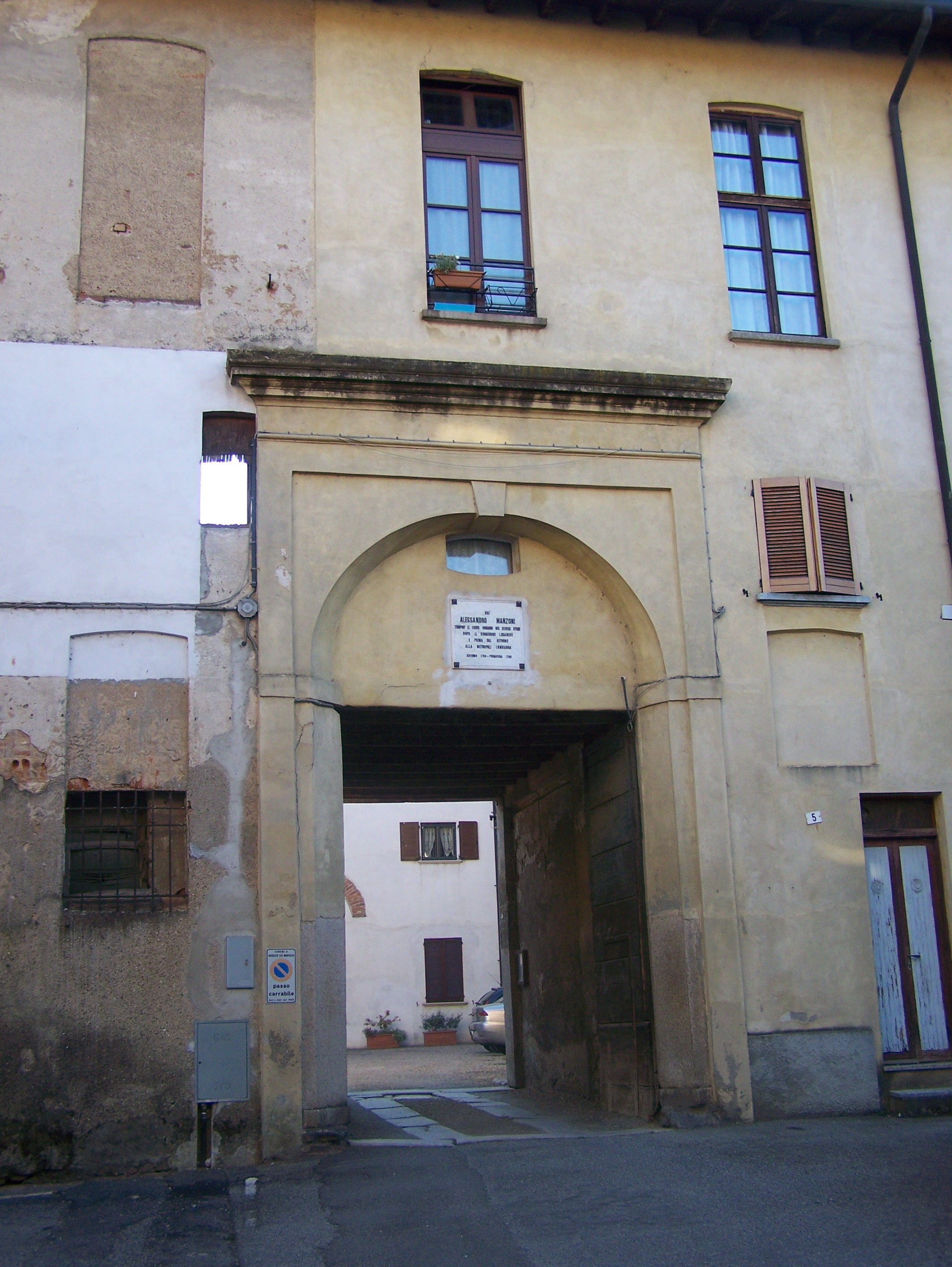 Portale di Villa Arconati a Castellazzo de' Barzi, frazione di Robecco sul Naviglio (MI) - Italy